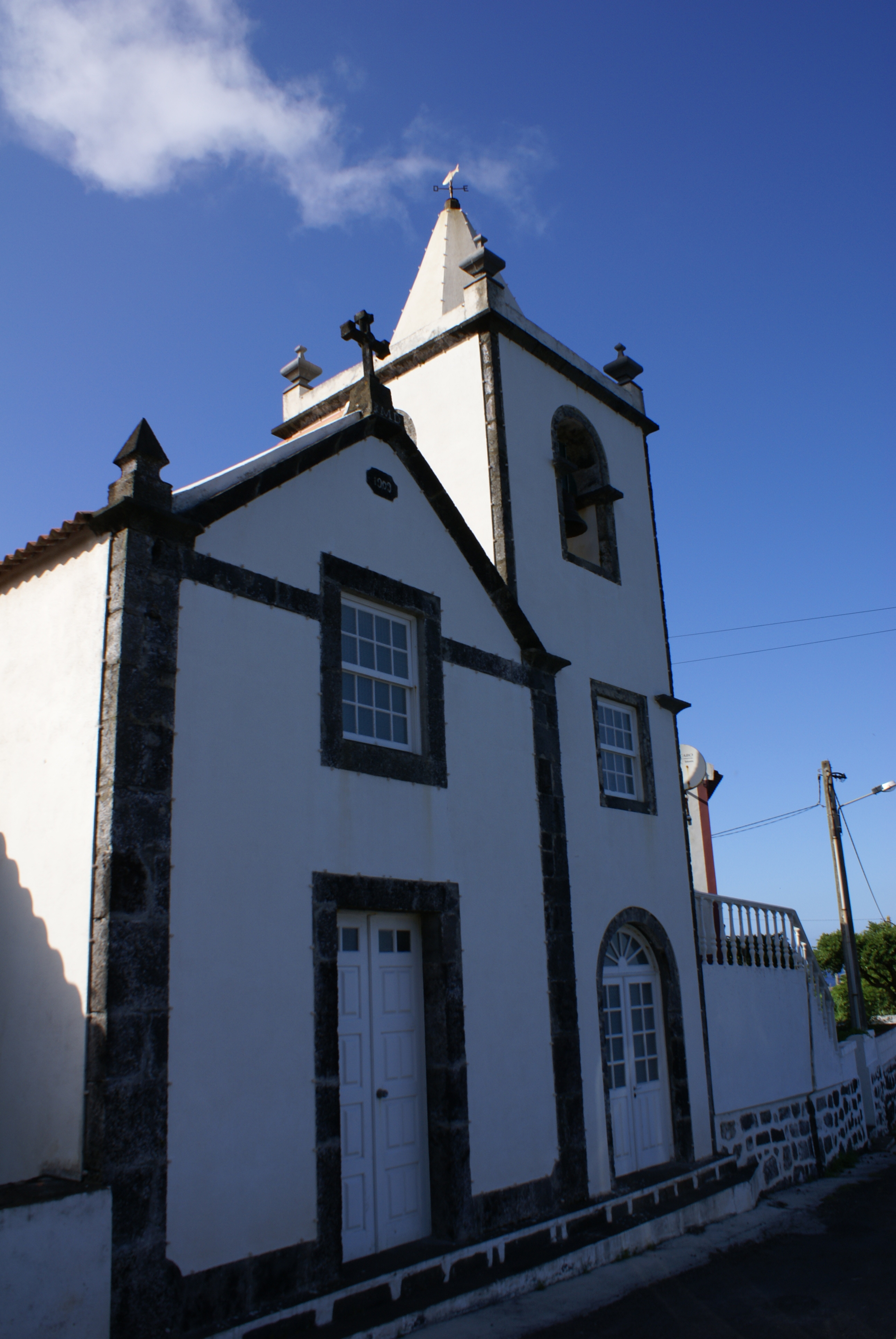 Igreja de Nossa Senhora das Dores, Fajã do Ouvidor, fachada, Norte Grande, Velas, Ilha de São Jorge, Açores